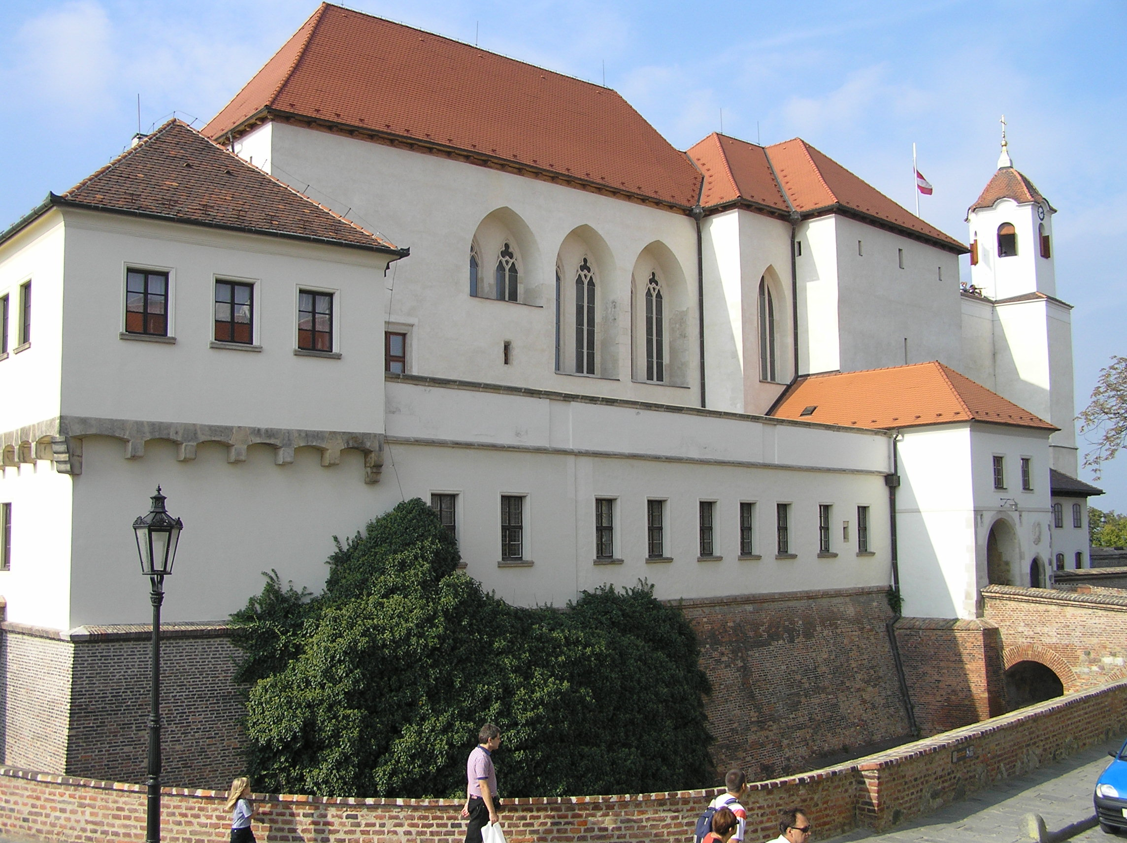 Twierdza Spielberg w Brnie